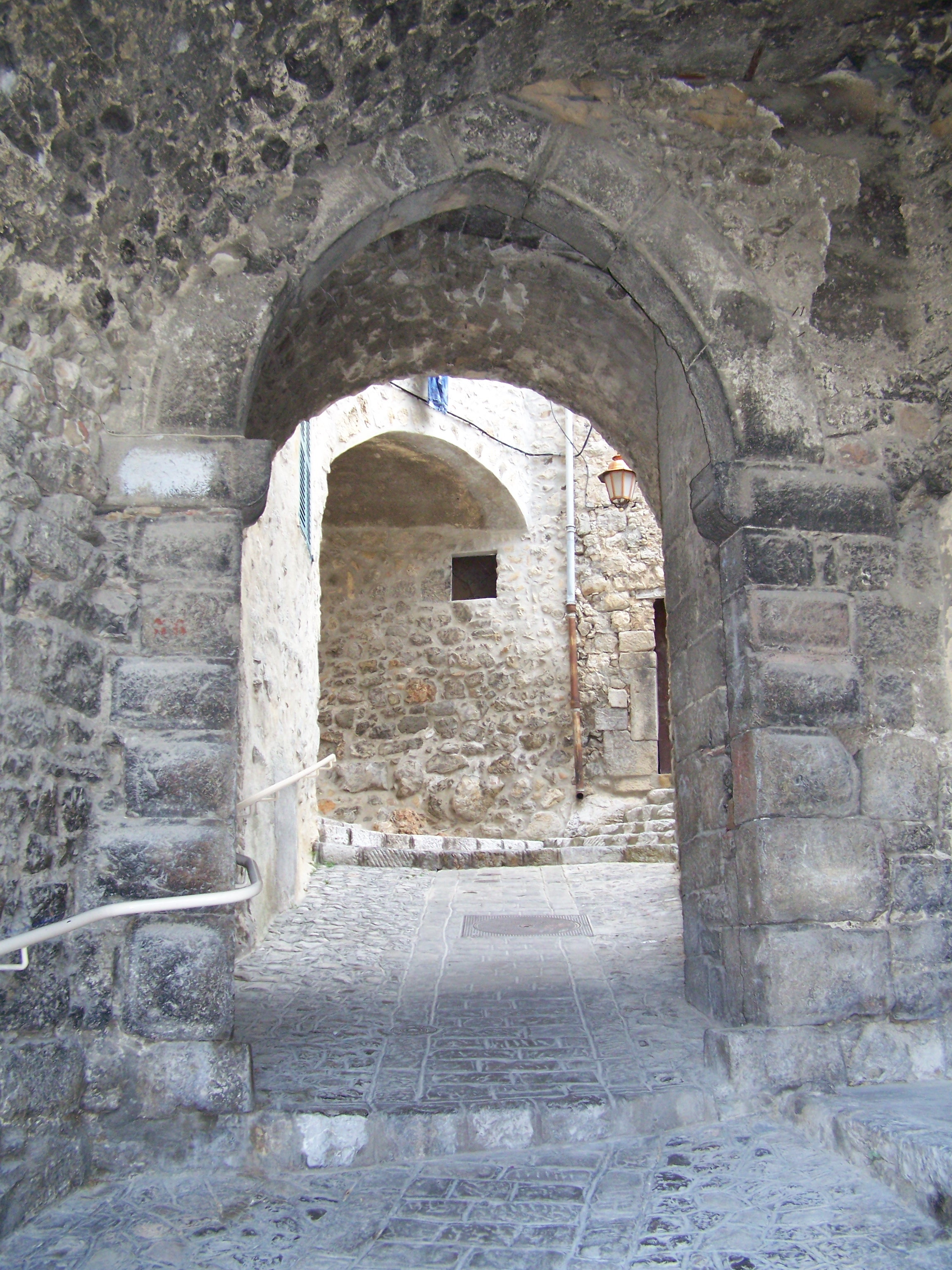 Porte de l'ancien château du village de Levens (Alpes-Maritimes, France)